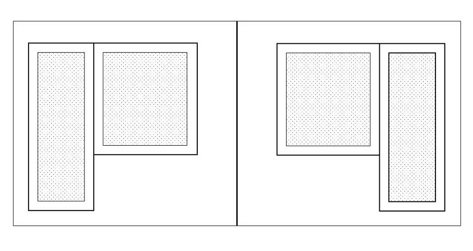 Schéma umístění dveří a okna u lodžie či balkonu panelového domu T06B. Obrázek není v žádném měřítku. Obrázek je pouze ilustrační.